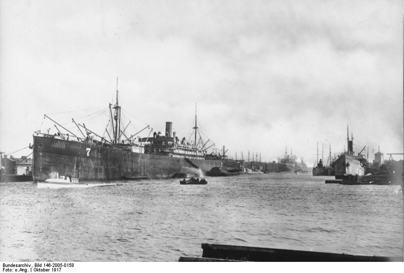 Zur Bestzung der Insel Ösel Transportflotte vor dem Auslaufen im Heimatshafen